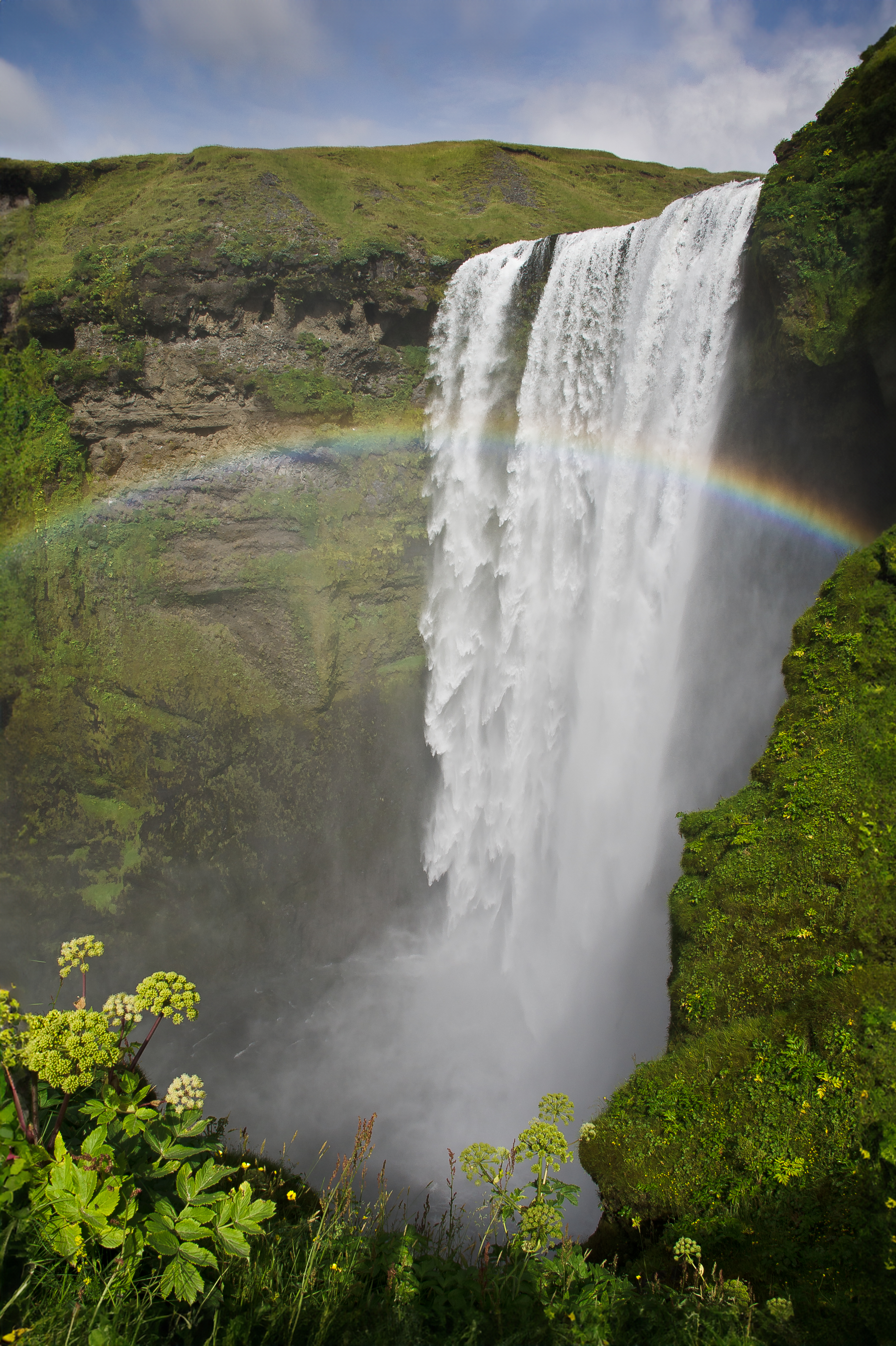 Skógafoss, Iceland